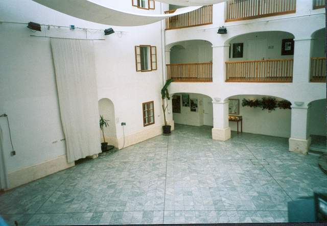 Innenhof Amthof Feldkirchen, Feldkirchen in Kärnten